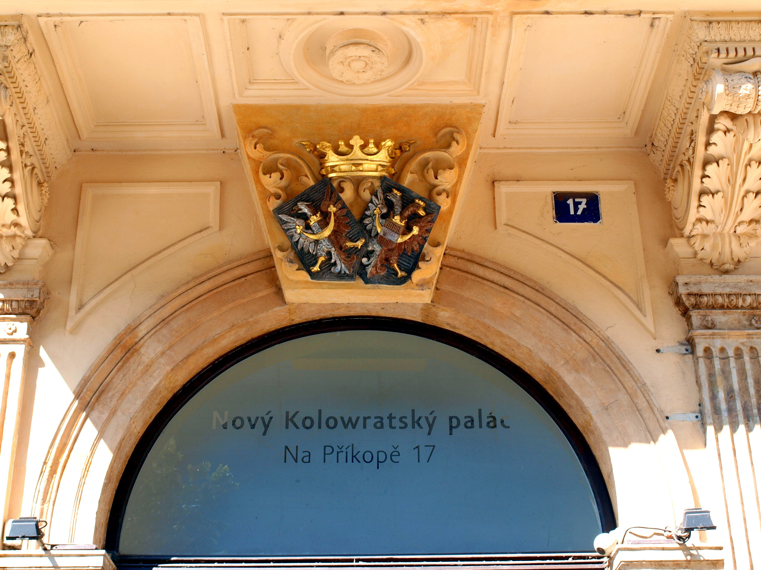 Nový Kolowratský palác. Erby Kolowratských, vlevo (heraldicky vpravo) Kolowrat-Krakowský, vpravo (heraldicky vlevo, se štítkem na hrudi) Kolowrat-Novohradský. Viď tab. 65